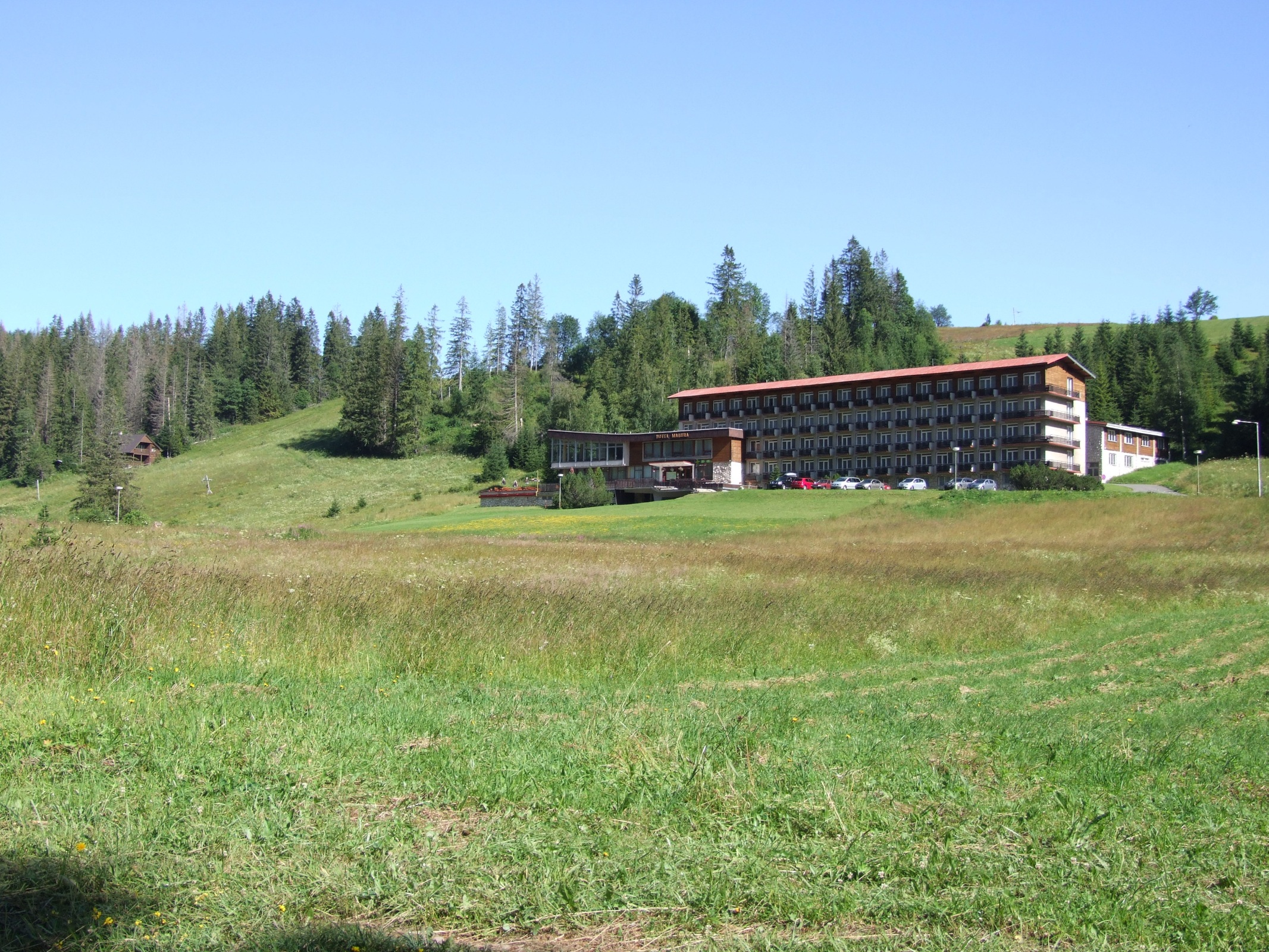 Hotel "Magura" w Dolinie Bielskiego Potoku (Żdziar)